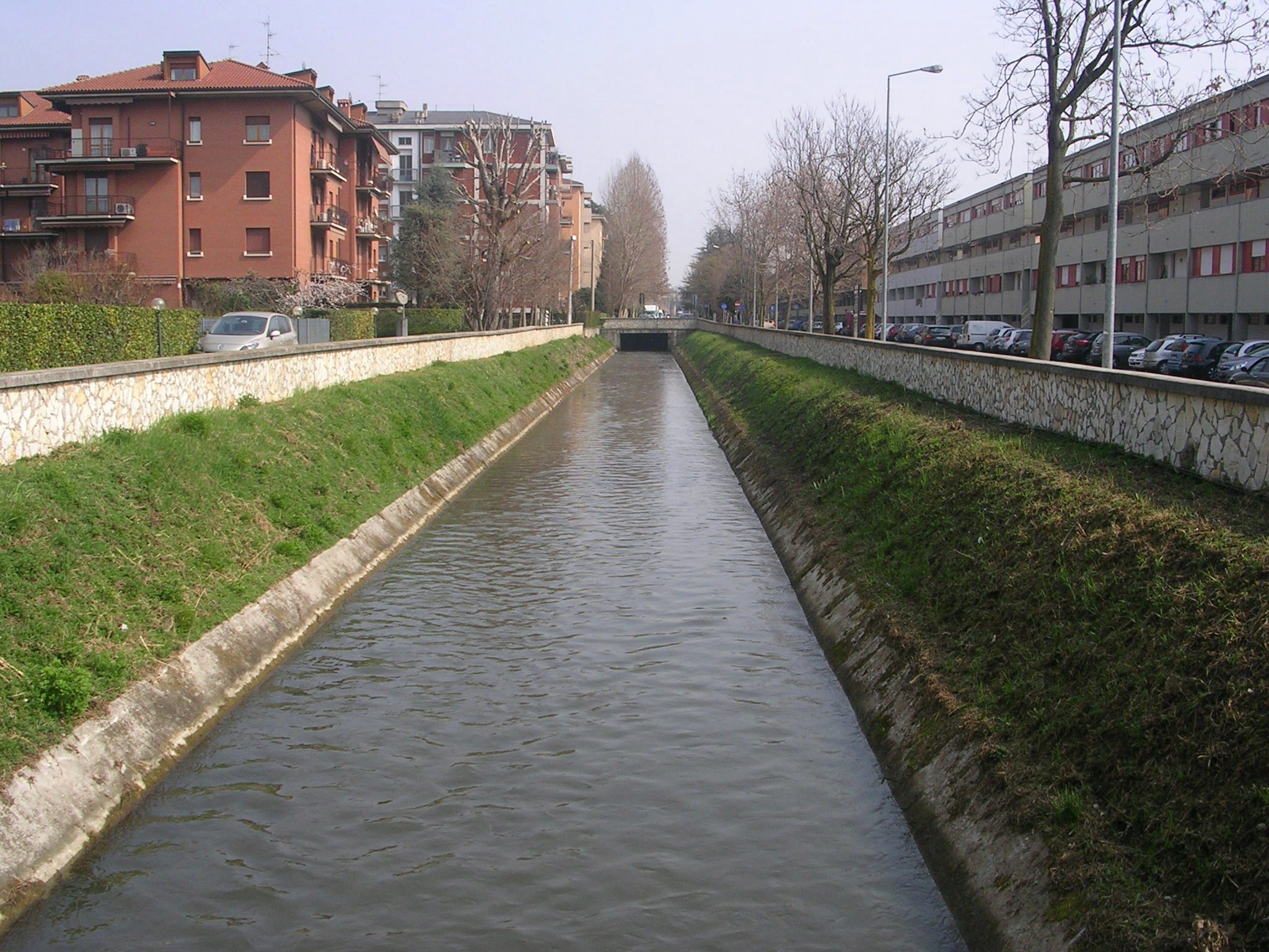 La roggia Serio Grande presso il quartiere di Loreto (Bergamo)